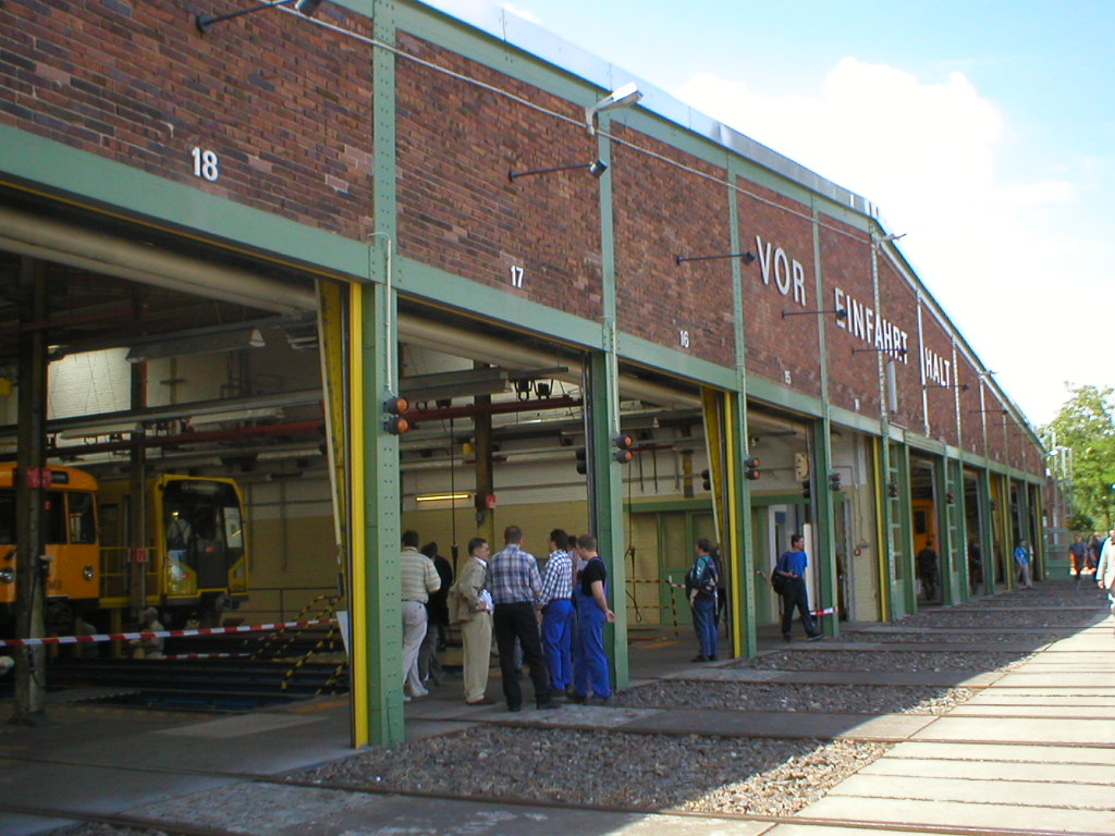 U-Bahn Berlin - Wagenhalle II der Betriebswerkstatt Friedrichsfelde am Tag der Offenen Tür